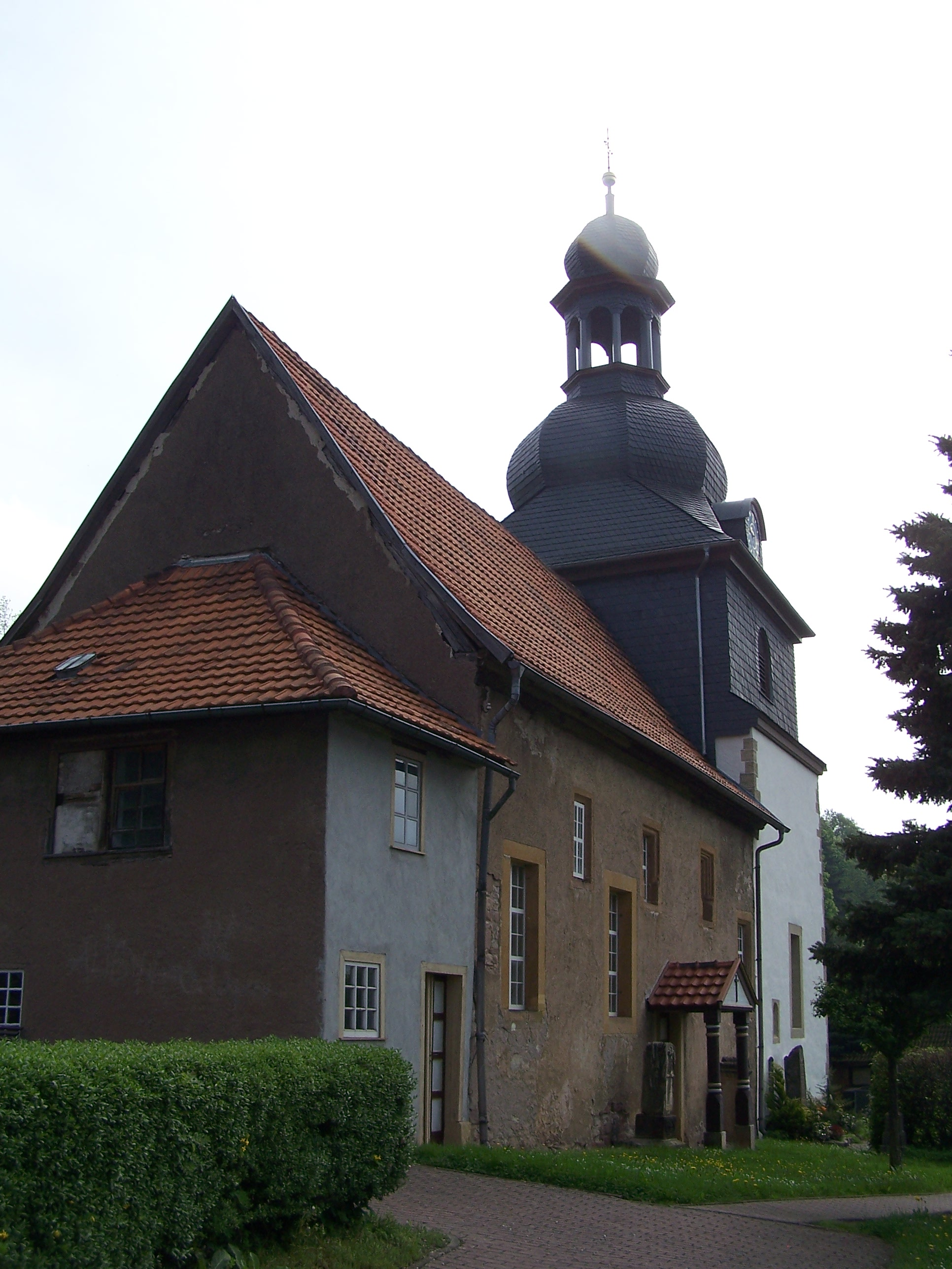 Ansichten und Details zur Johanneskirche in Sättelstädt.